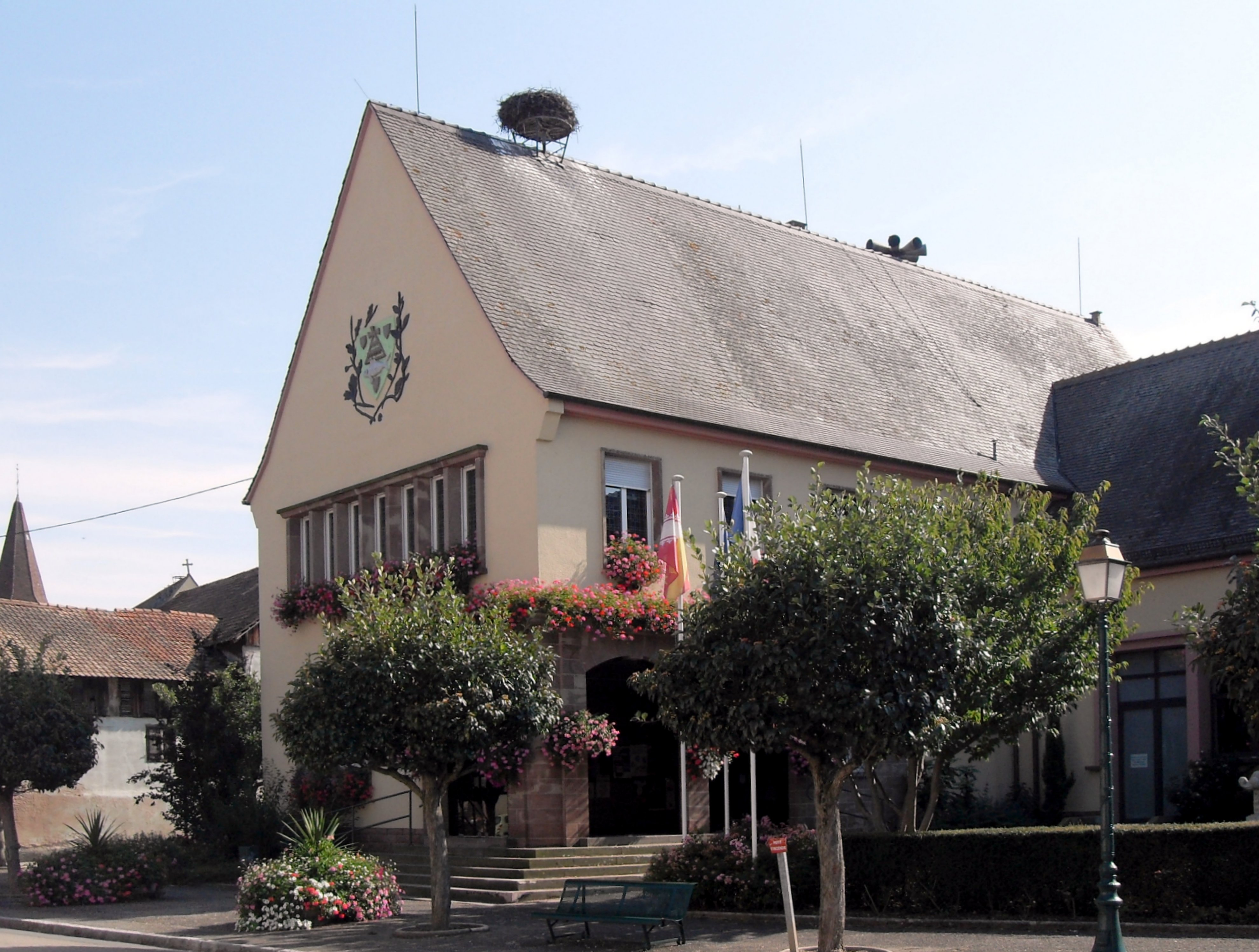 L'hôtel de ville de Guémar